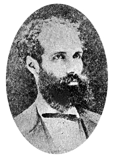 Nicolas Infante Diaz. (4 sep.1847 Palenque, Vinces – 1 ene.1885, Palenque) Ilustre vinceño (palenqueño), héroe y mártir del liberalismo ecuatoriano.